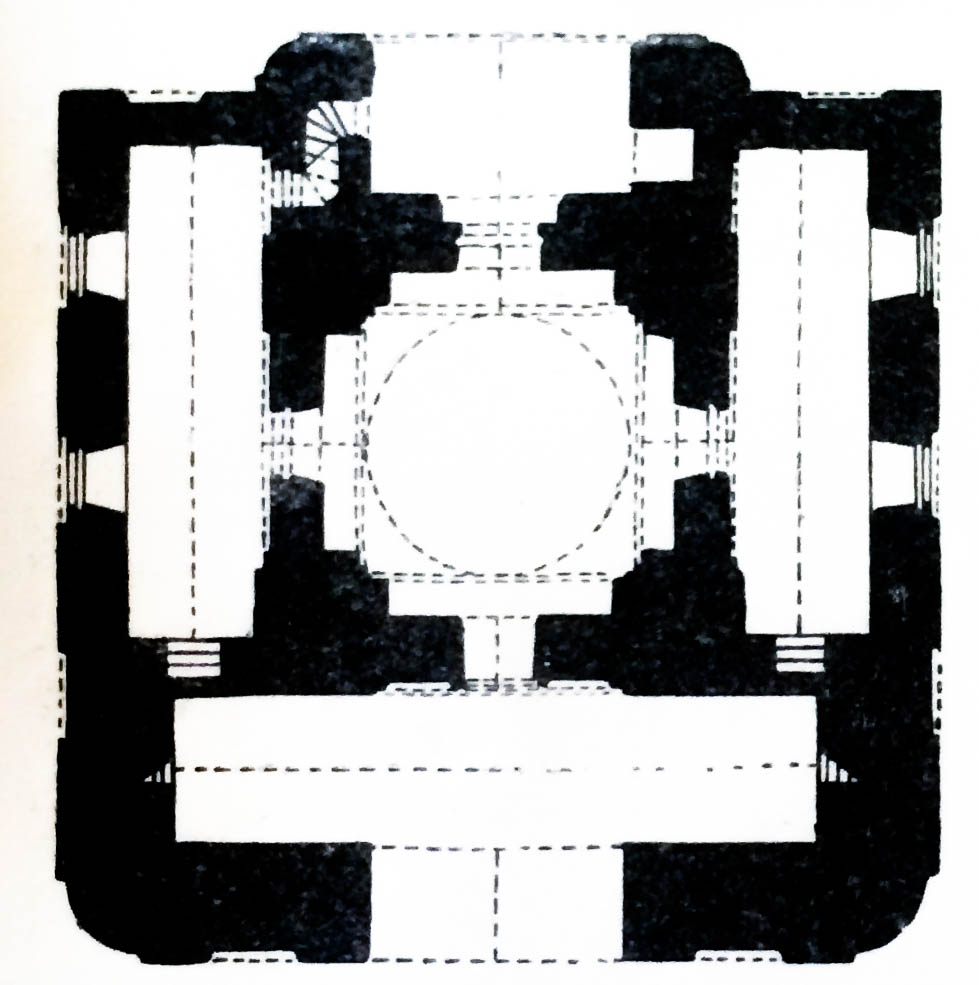 Bərdə imamzadəsinin planı